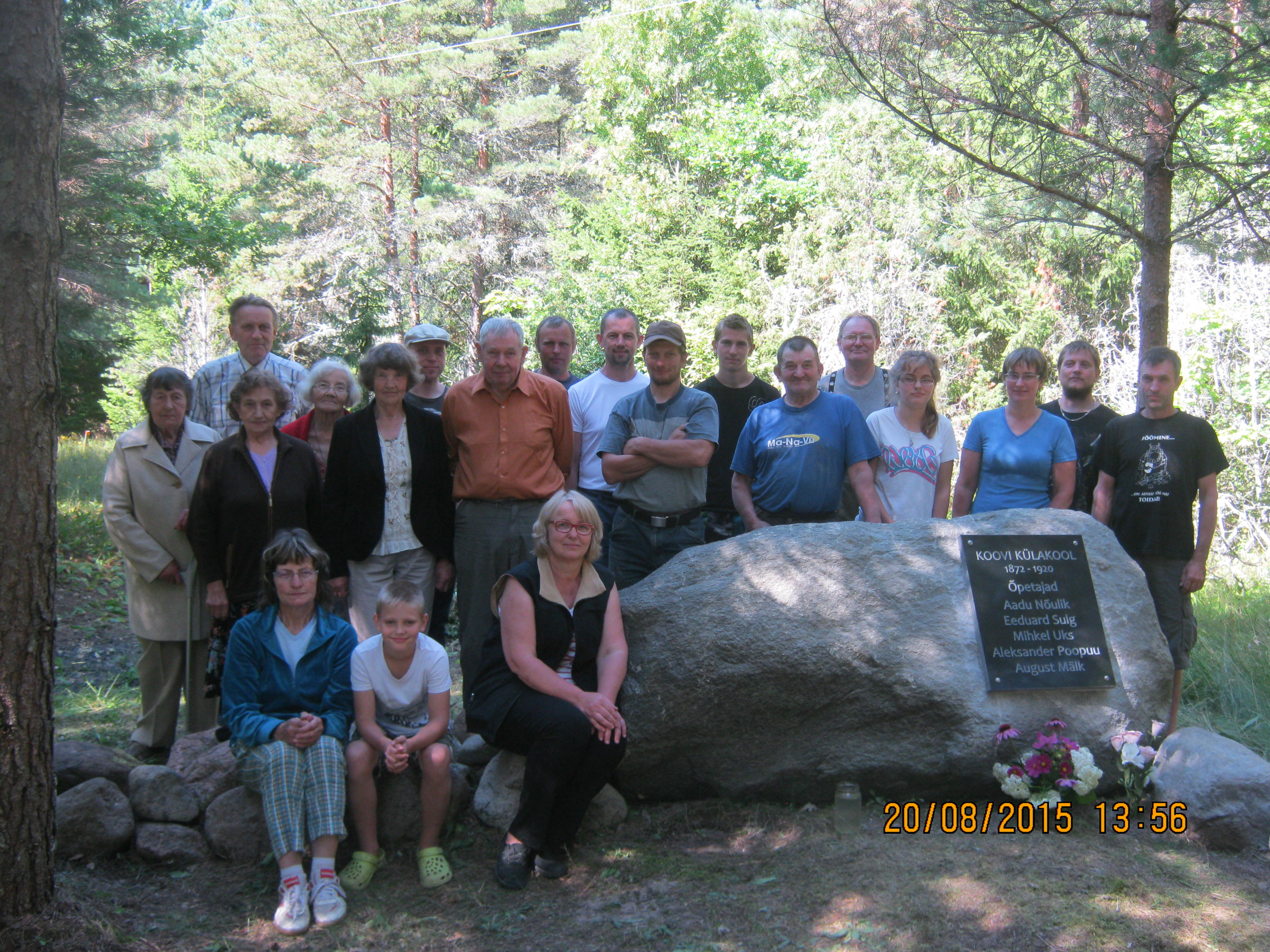 Pildil on inimesed, kes osalesid mälestusplaadi avamisel ja ümbruse korrastamisel